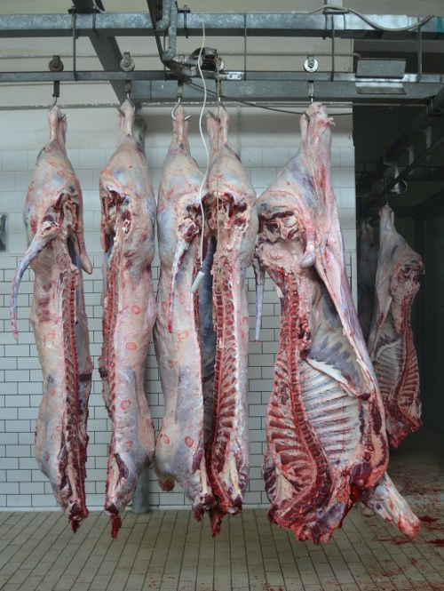 Carni bovine macellate.